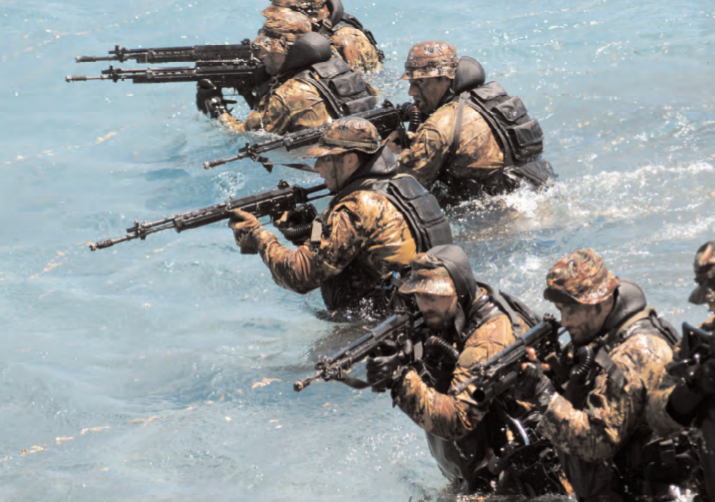 Marò del 1° reggimento San Marco della Marina militare italiana in una "presa di terra"